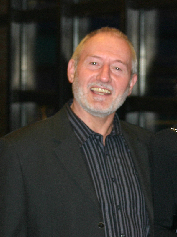 Der Schauspieler Sepp Schauer (u. a. "Sturm der Liebe", "Wilder Kaiser", "Kir Royal" im Oktober 2005 in München.